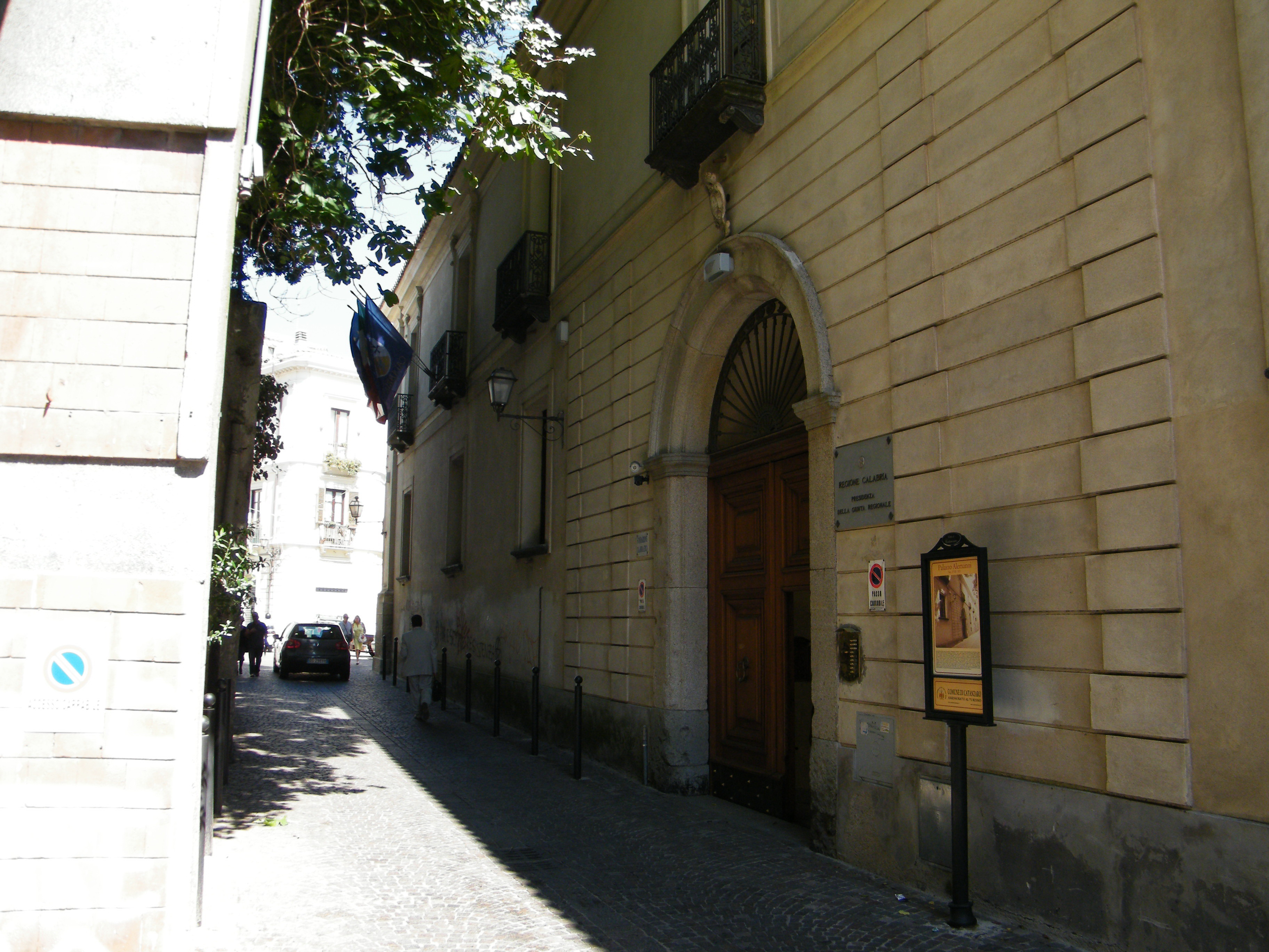 Palazzo Alemanni, sede della presidenza della giunta regionale calabrese. Vista da destra.